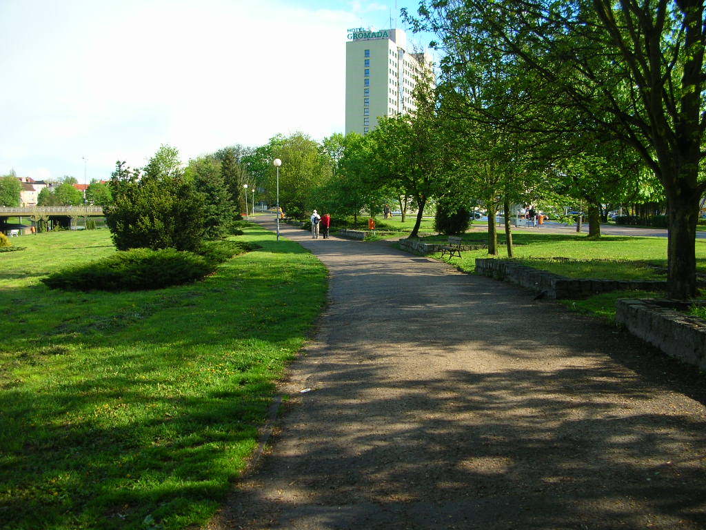 Piła - Bulwary nad rzeką Gwdą w Centrum mista. Autor - Bartek Wawraszko